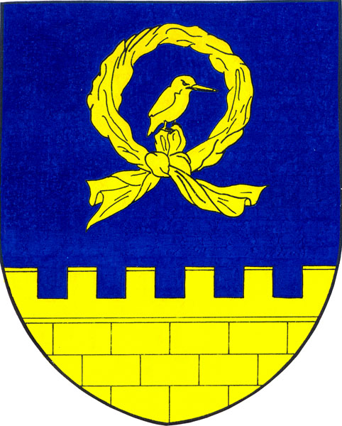 Znak obce Točník